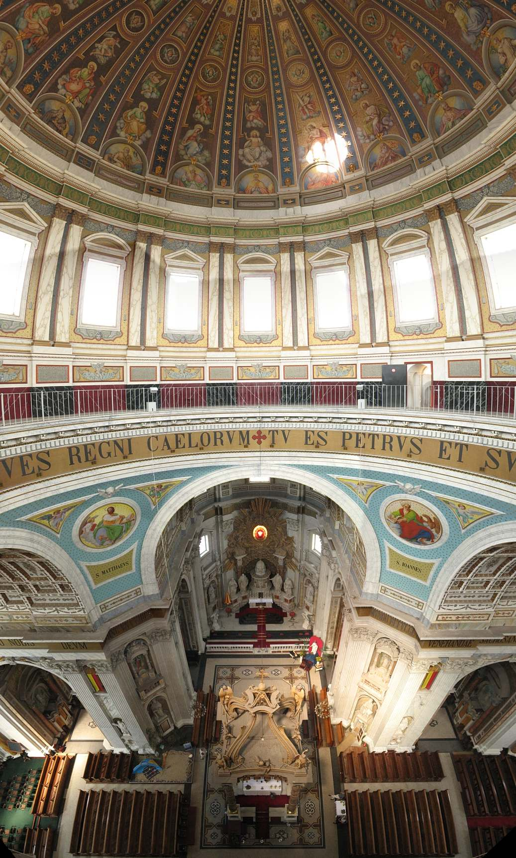 De Basiliek van de Heiligen Agatha en Barbara is een rooms-Katholieke kerk te Oudenbosch. Interieur van basiliek van Oudenbosch, verticale panoramafoto vanuit koepel (180 graden)